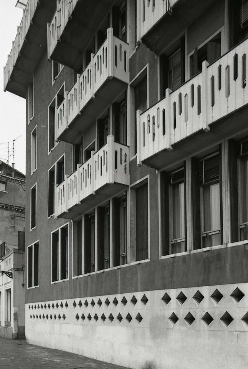 Servizio fotografico : Venezia, 1982 / Paolo Monti. - Strisce: 2, Fotogrammi complessivi: 8 : Negativo b/n, gelatina bromuro d'argento/ pellicola ; 35 mm. - ((Sul portanegativi: N[I]K[MA]T-EL FP4. - La serie è identificata da Monti con segni grafici e inventariali, e distinta dalla precedente. - Occasione: Documentazione per la pubblicazione: Fleming John, Honour Hugh, Pevsner Nikolaus, Dizionario d'architettura, Torino, Einaudi, 1981. - Fonte: Agenda di Paolo Monti: Nikon Leika 3001-/ Monti 1978 (1978-1982), presso Archivio Paolo Monti. - Fonte: Fattura di Paolo Monti: IV. Commesse/ Fattura n. 38/ Fotografie di archivio per Dizionario di Architettura di Pevsner (1981/11/01), presso Archivio Paolo Monti. N. 40 foto formato 24x30. - Fonte: Monografia di Fleming John, Honour Hugh, Pevsner Nikolaus: Dizionario d'architettura, Torino, Einaudi (1981)